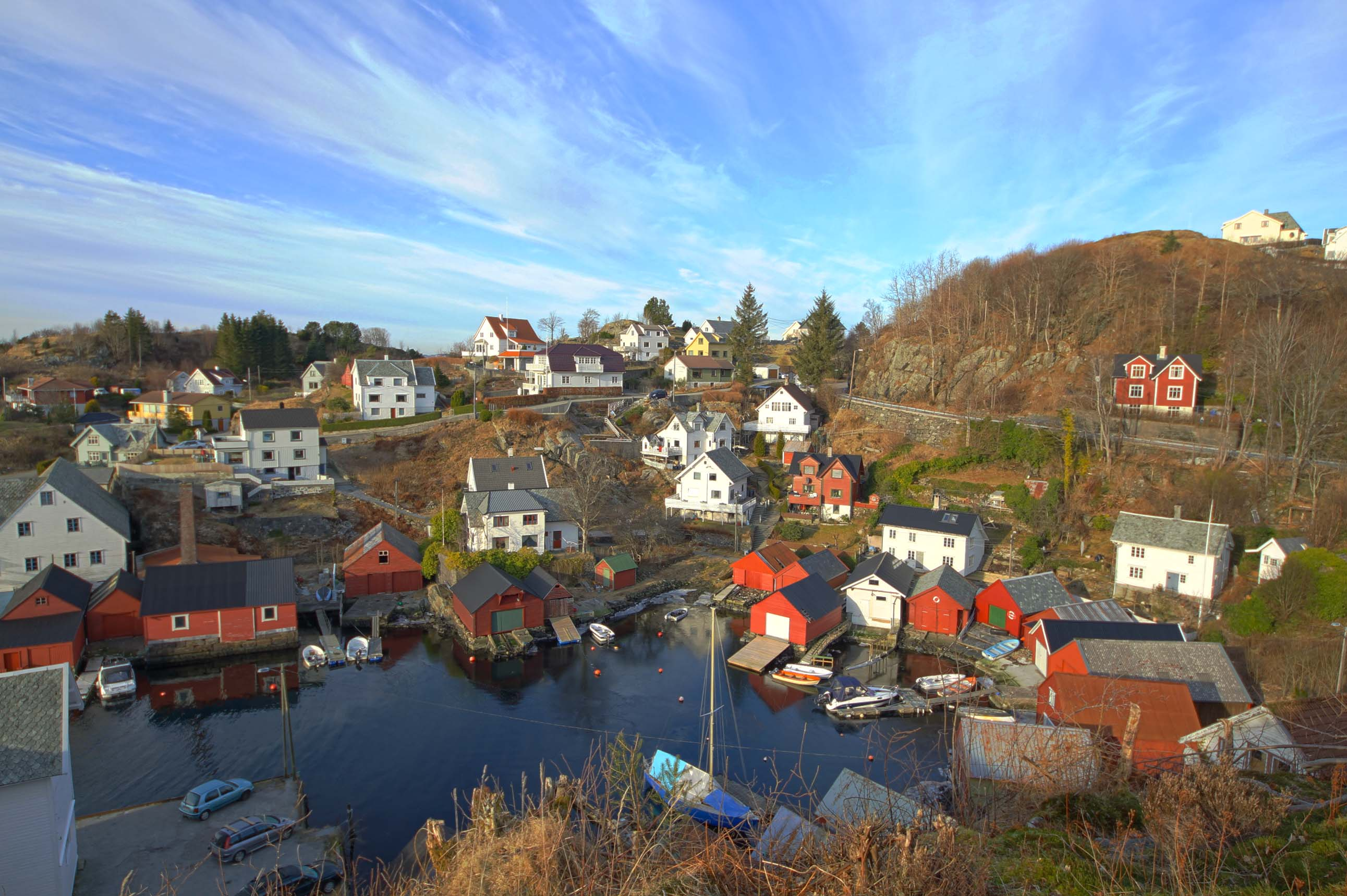 Follesevågen, Askøy, Hordaland, Norway